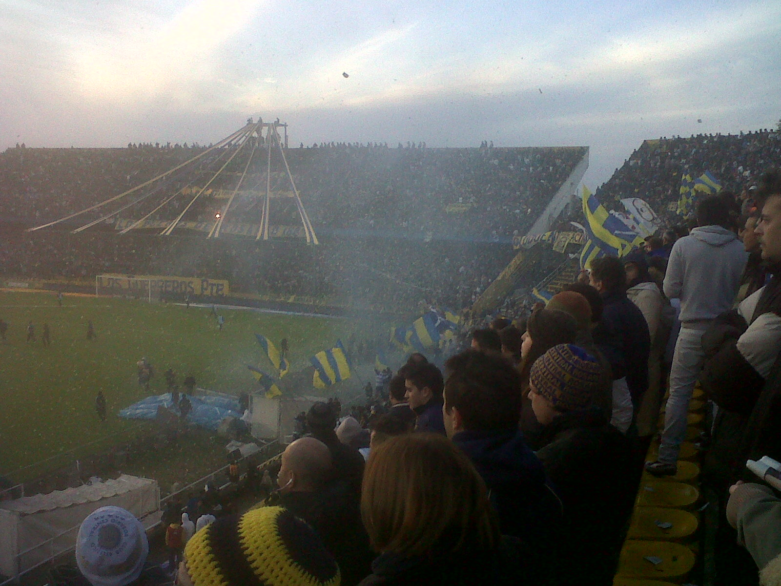 Instantes previos al comienzo del partido entre Rosario Central y Godoy Cruz por el Torneo Inicial 2013.